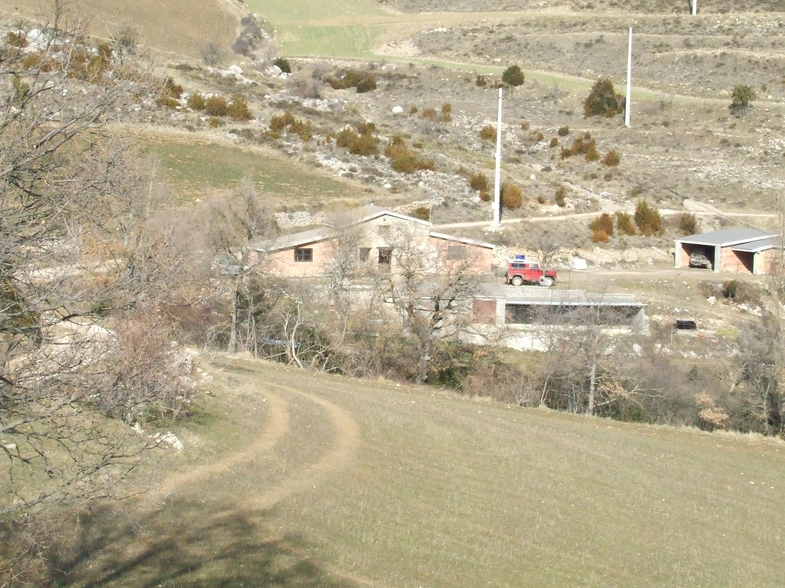 Cal Sol (Bóixols, Abella de la Conca, Pallars Jussà)